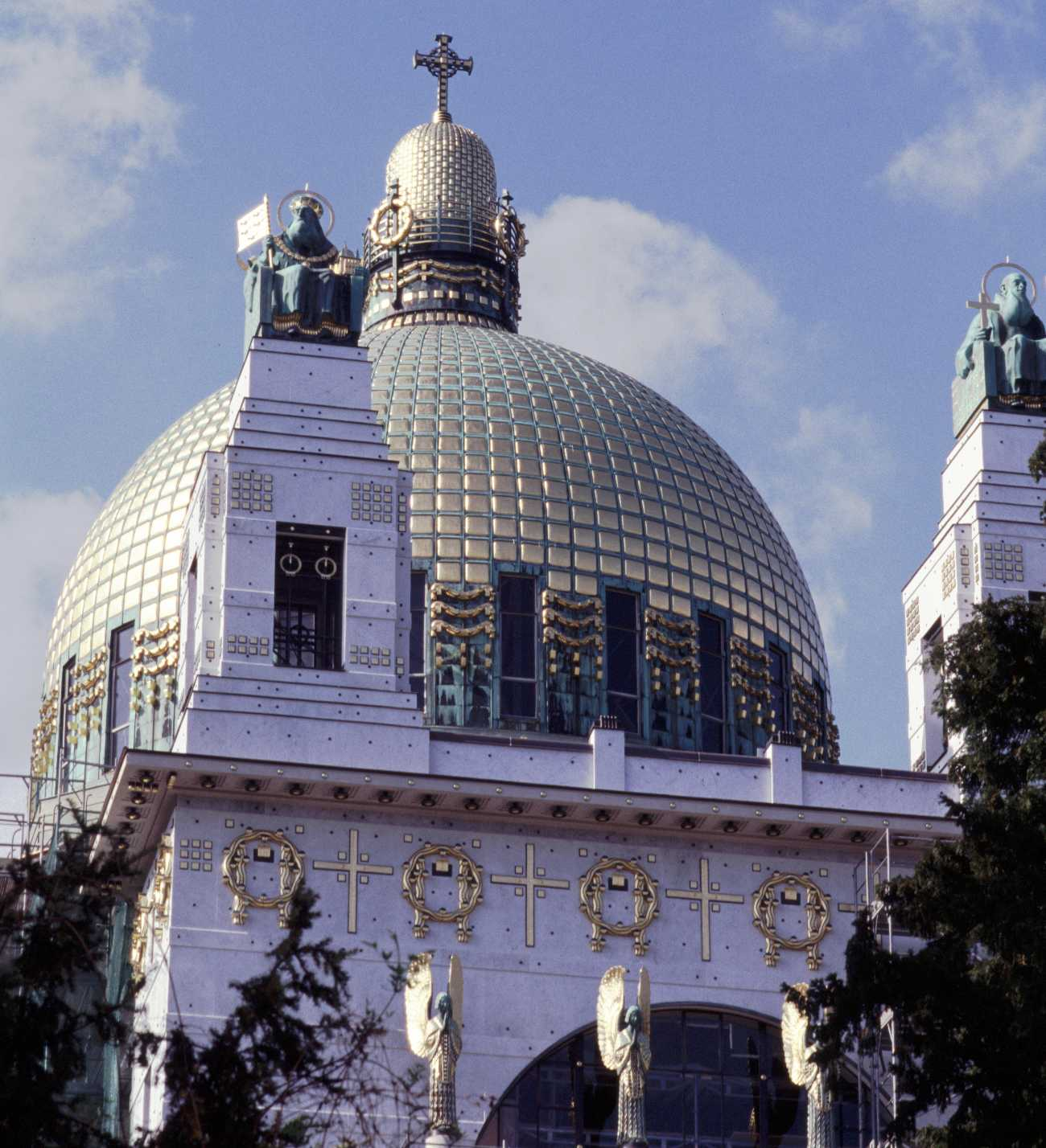 Die Kirche am Steinhof (Wien) von Otto Wagner soll die einzige Jugendstilkirche der Welt sein. Mai 2005, die Bildausschnitte richten sich nach dem Baugerüst.